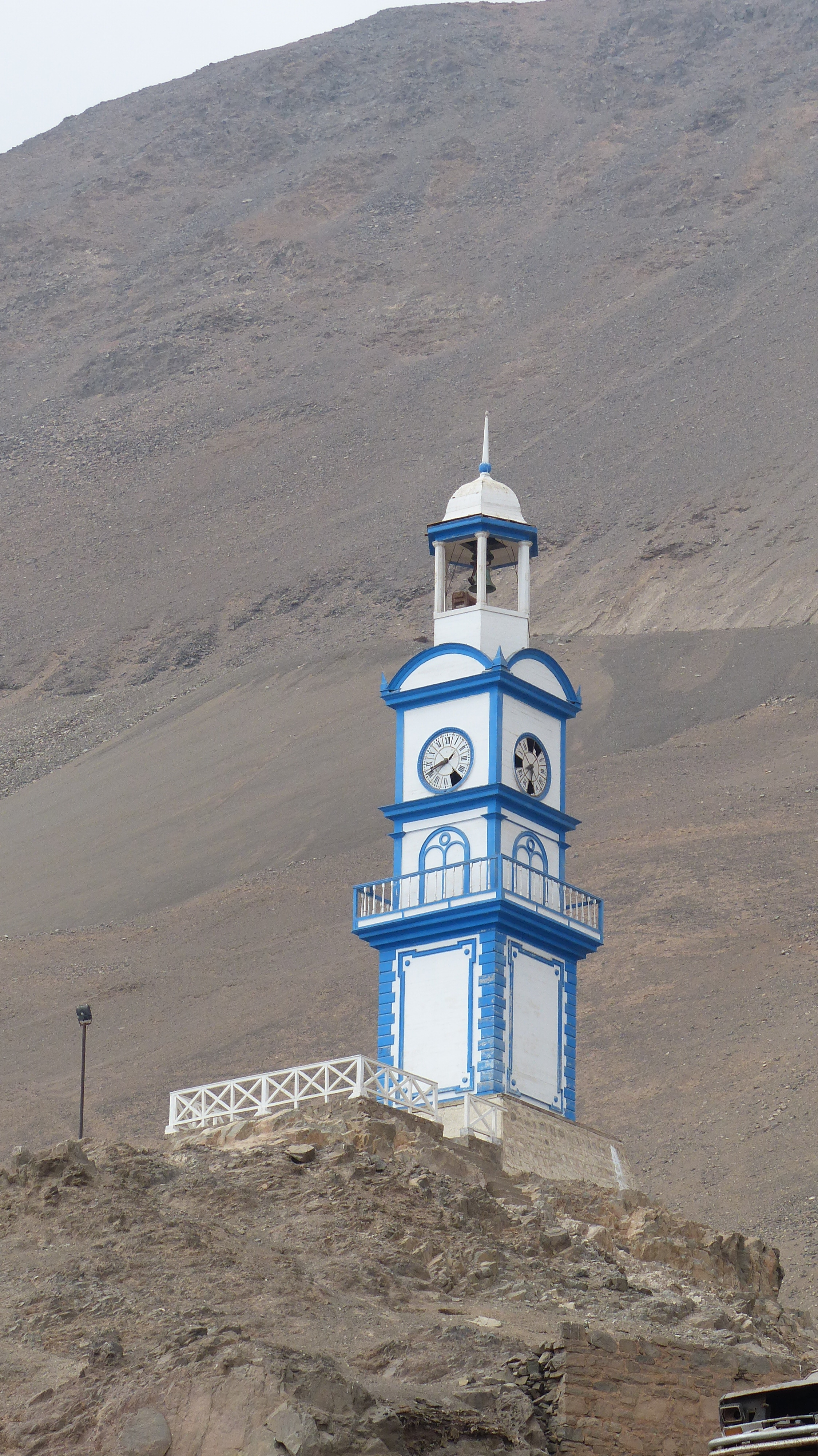 Torre Reloj de Pisagua This is a photo of a national monument in Chile: 283